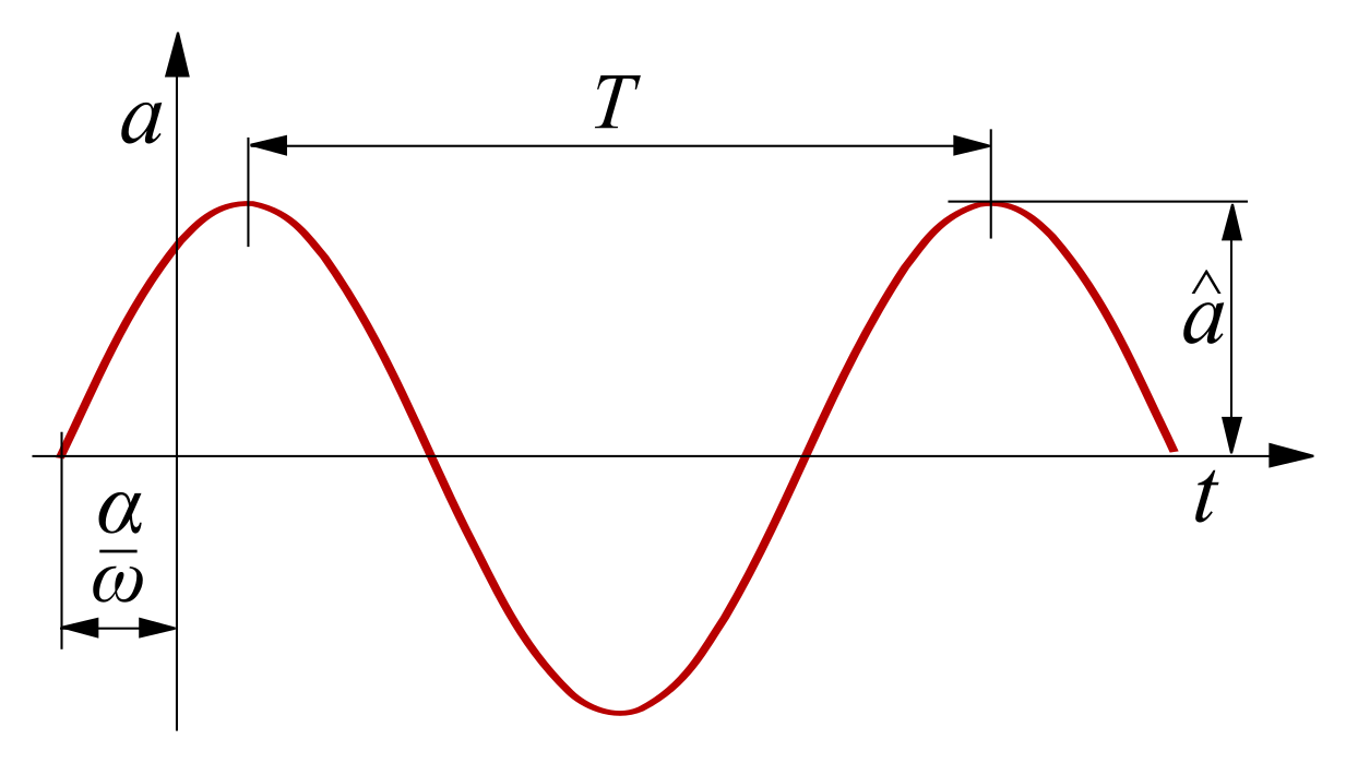 Växelströmsförlopp, definitioner